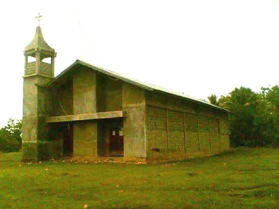 Tetun: Igreja Katolika Suku Vessoru Nian